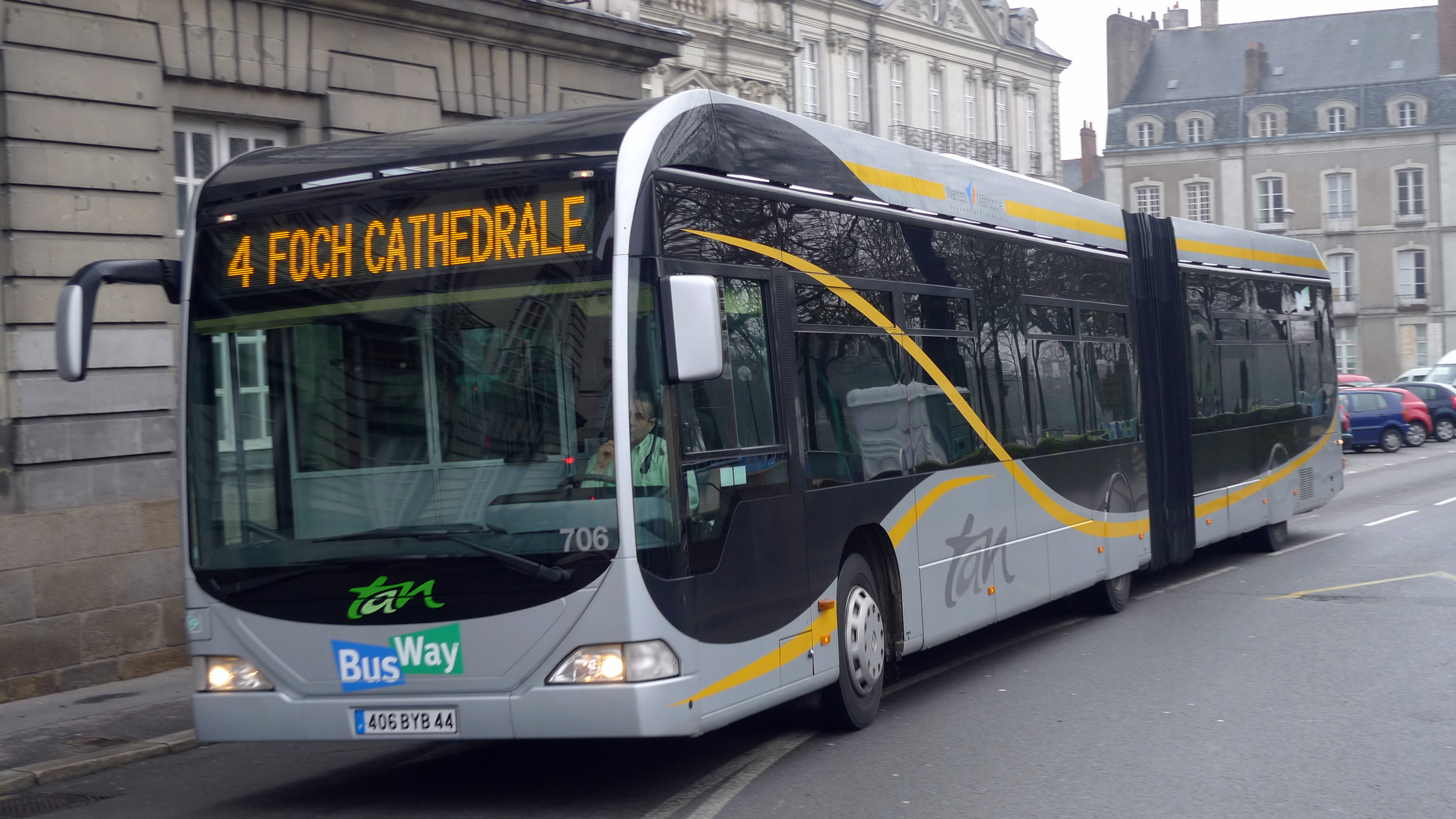 Mercedes-Benz Citaro G de la ligne 4 (Busway) de Nantes